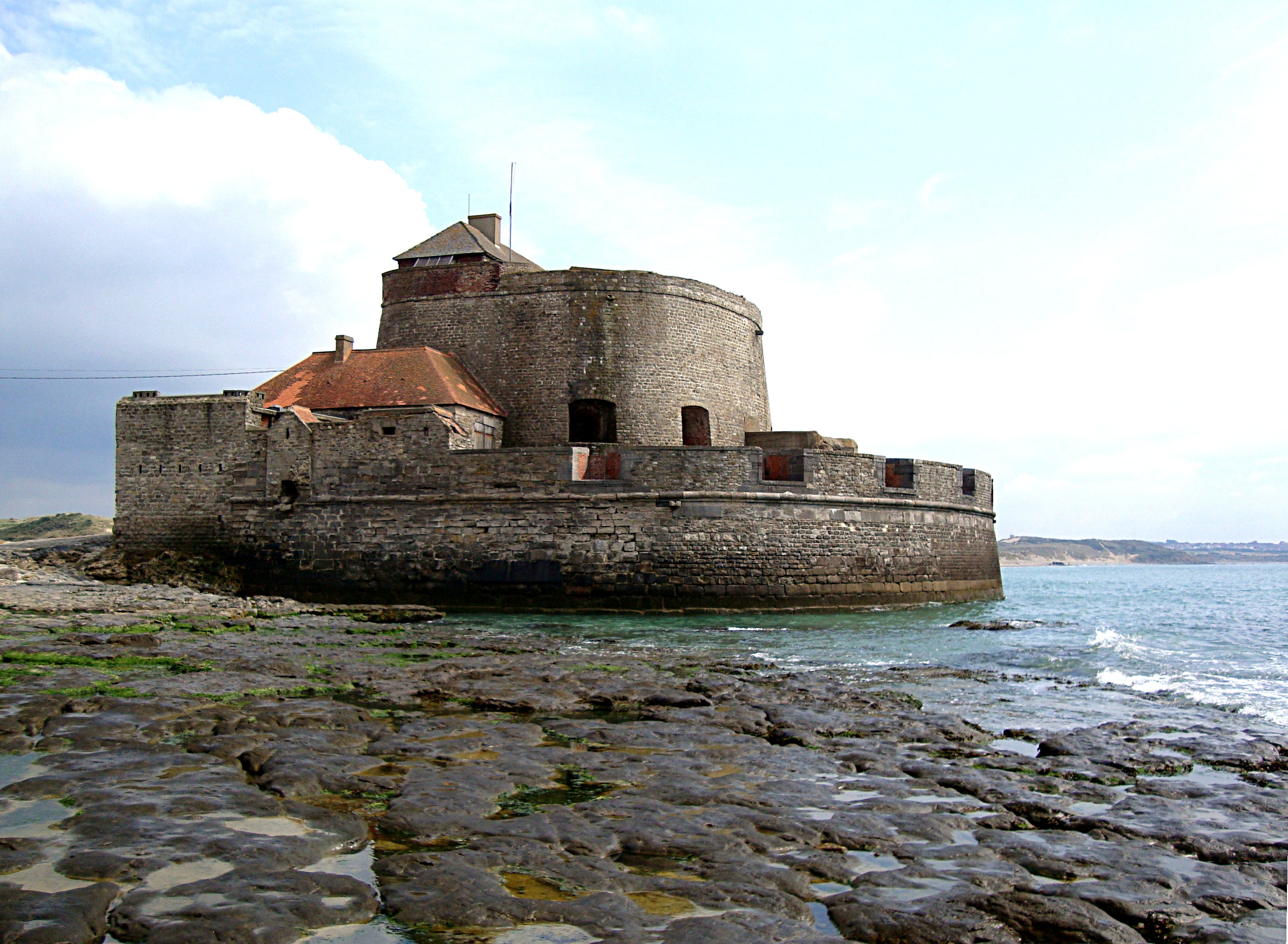 Le fort Mahon à Ambleteuse (Pas-de-Calais).